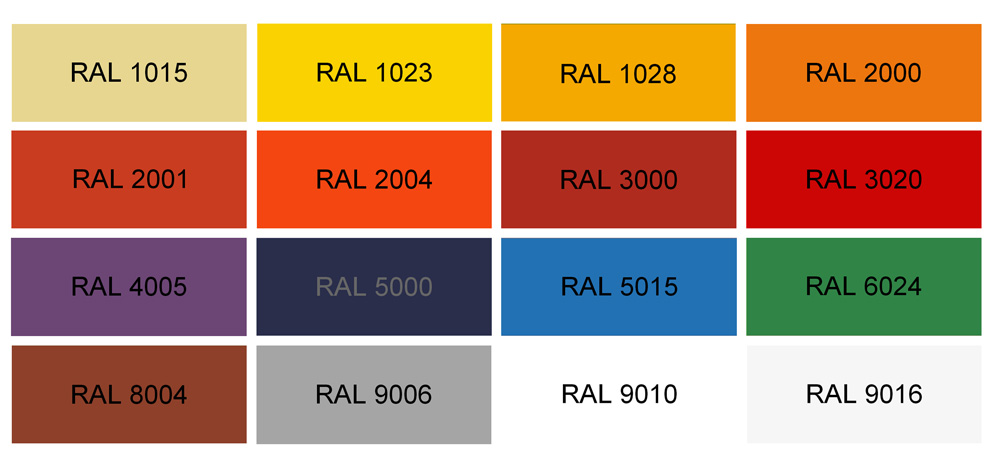 رنگهای موجود گالوانیزه